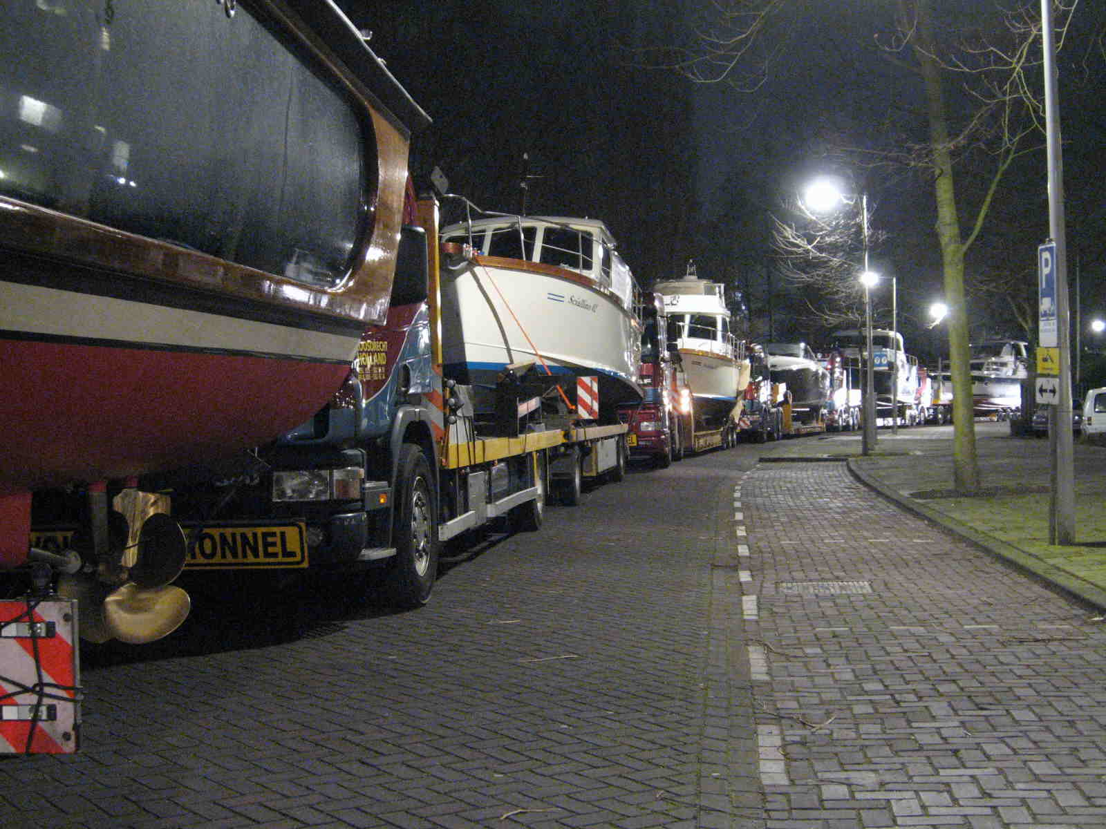 Hiswabotenparade op weg naar de RAI